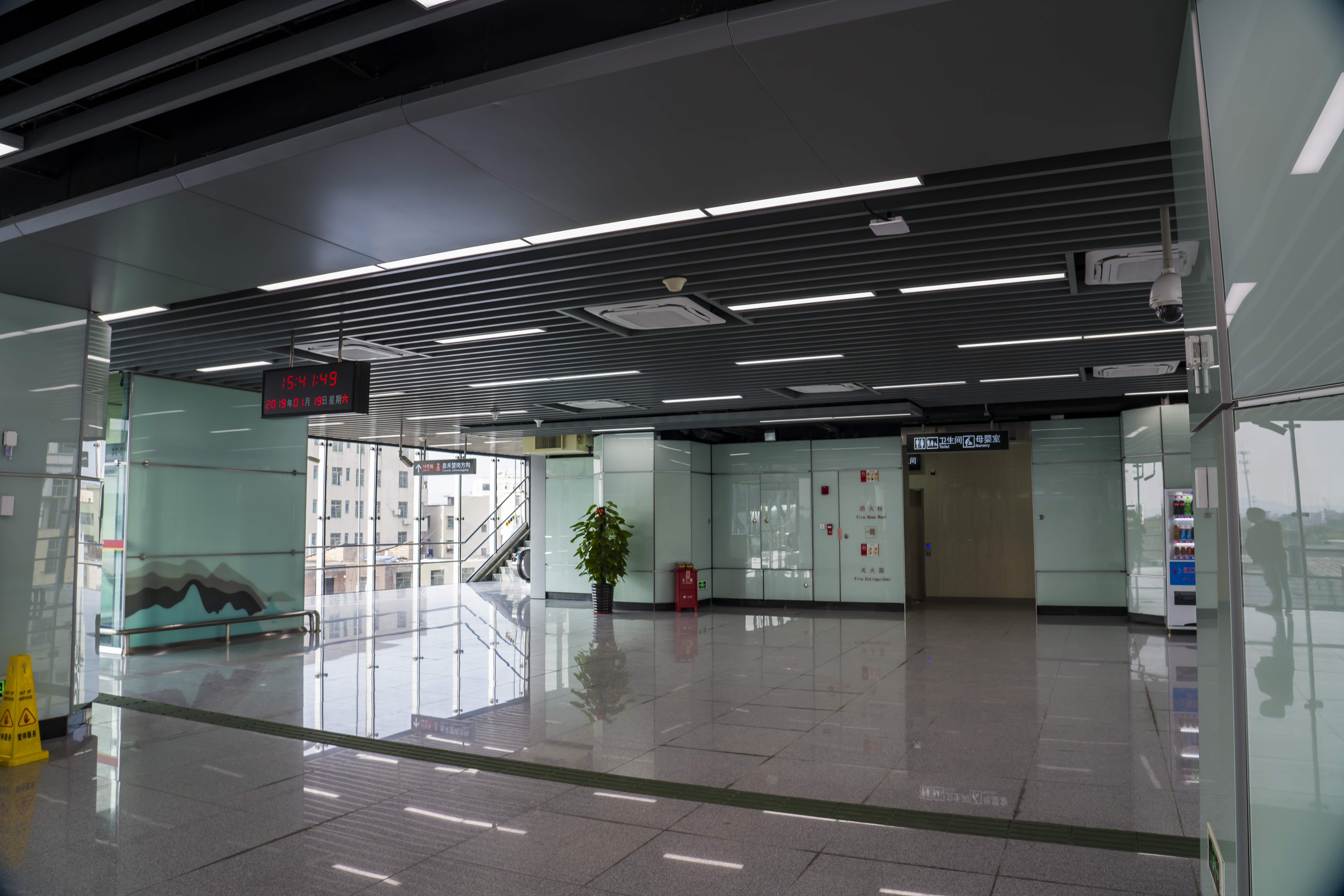 马沥站站厅